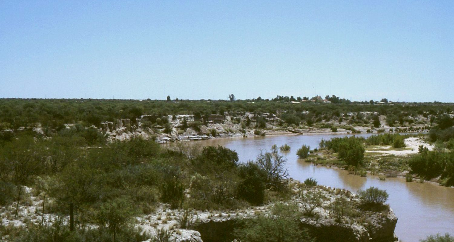 Argentinien/Argentina, Río Desaguadero bei/cerca de/next to Desaguadero, Prov. Mendoza-San Luis